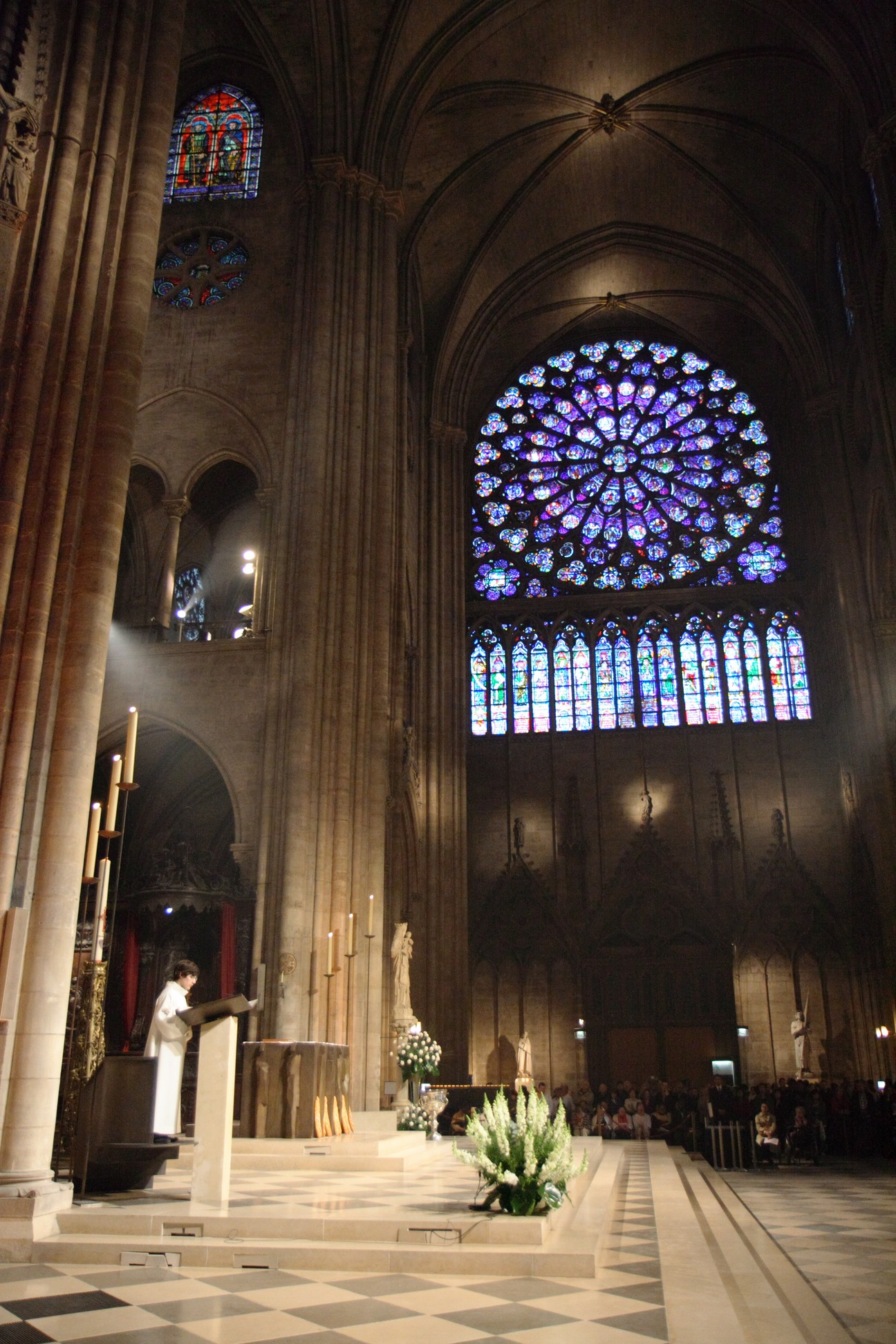 Messe, cathédrale de Notre-Dame de Paris